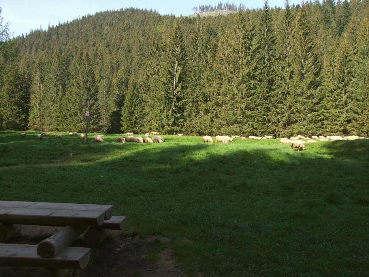 Cudakowa Polana